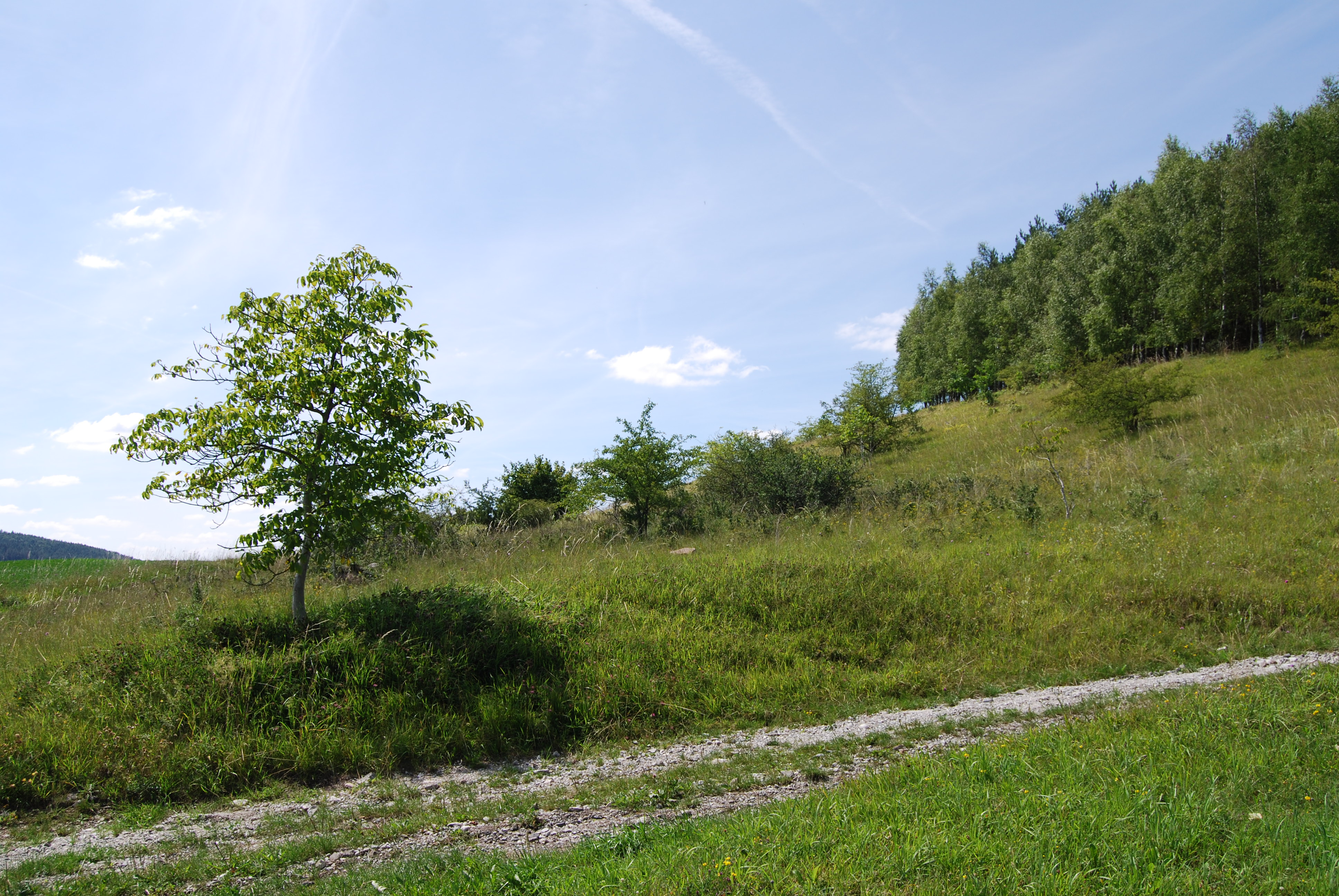 Pohled na okolí obce. Skoupý je malá část obce Petrovice v okrese Příbram. Česká republika.